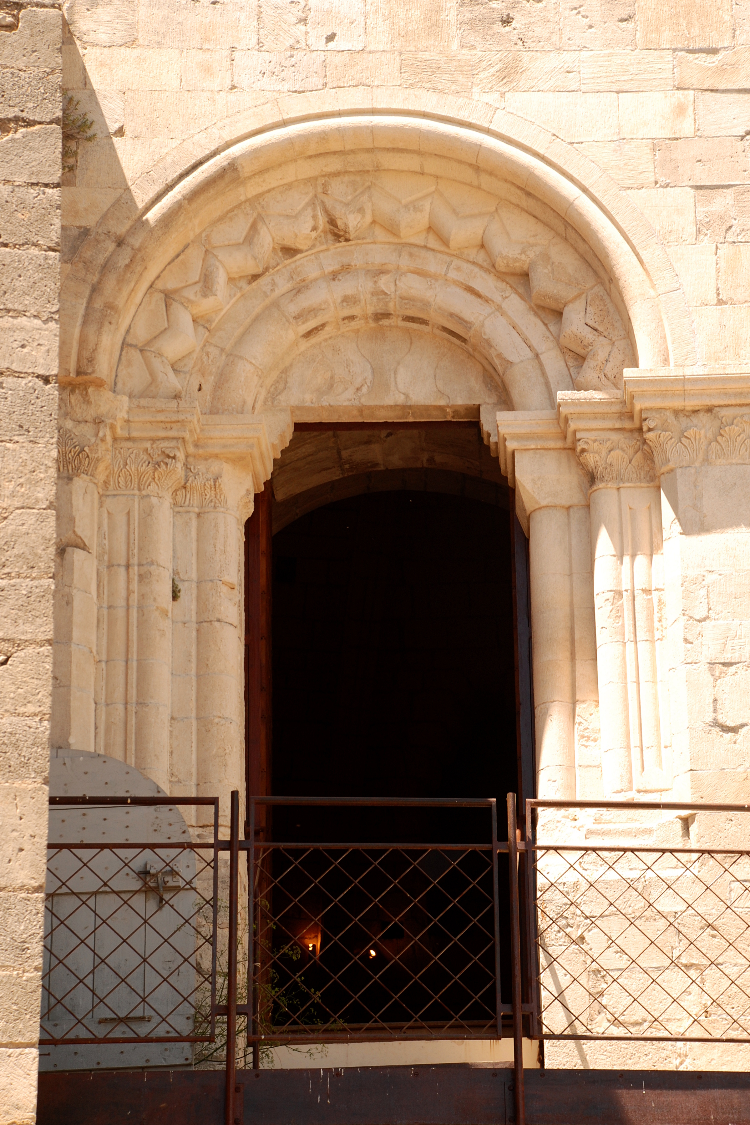 France - Provence - Château de Simiane-la-Rotonde